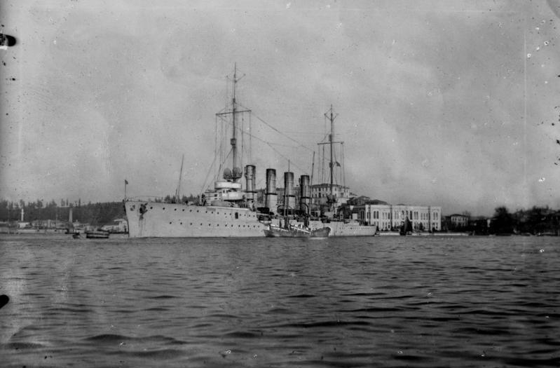 Türkei, Kreuzer Breslau Kleiner Kreuzer Breslau Stapell.: 16.5.1911 [Kreuzer Breslau unter türkischer Flagge "Midillih"]